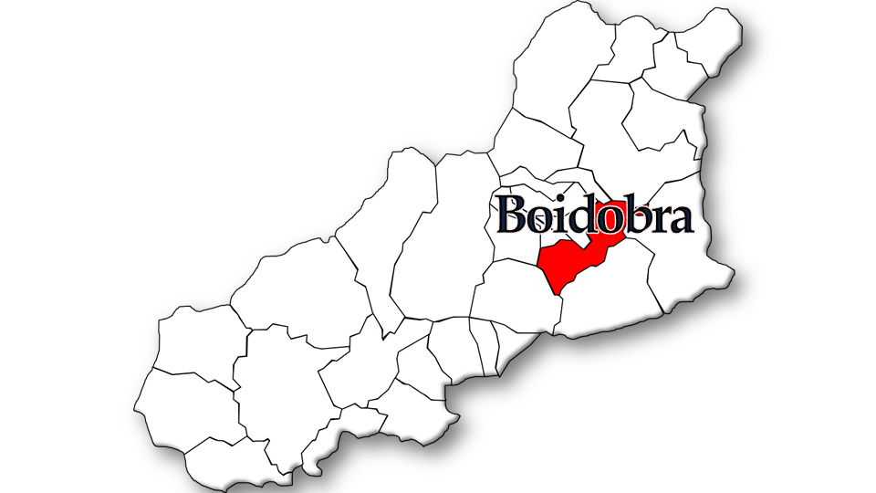 População